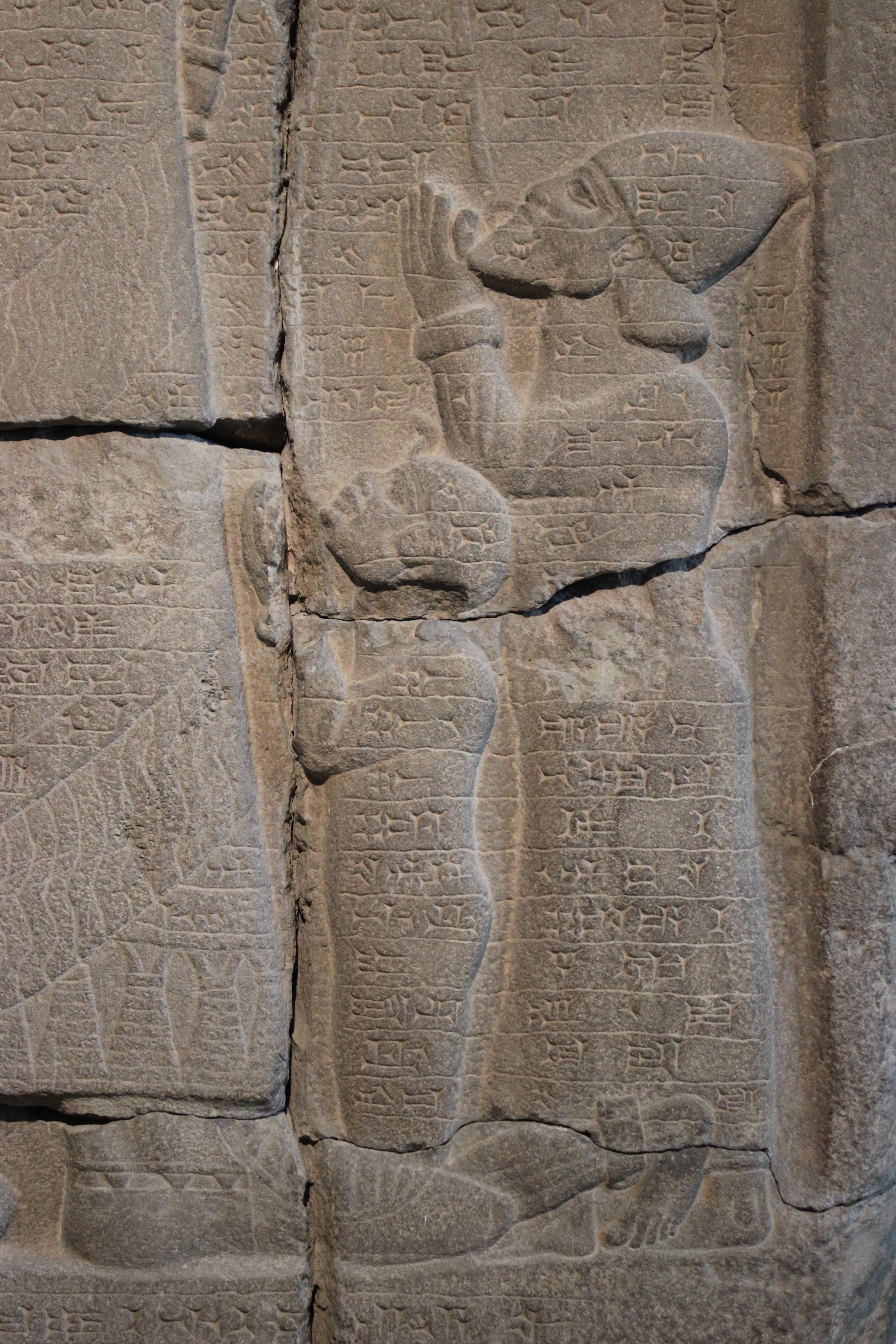 Berlín. Pergamon Museum, estela de Asarhadon. 671 a.C.